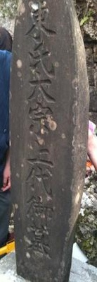 東氏太宗上代御墓